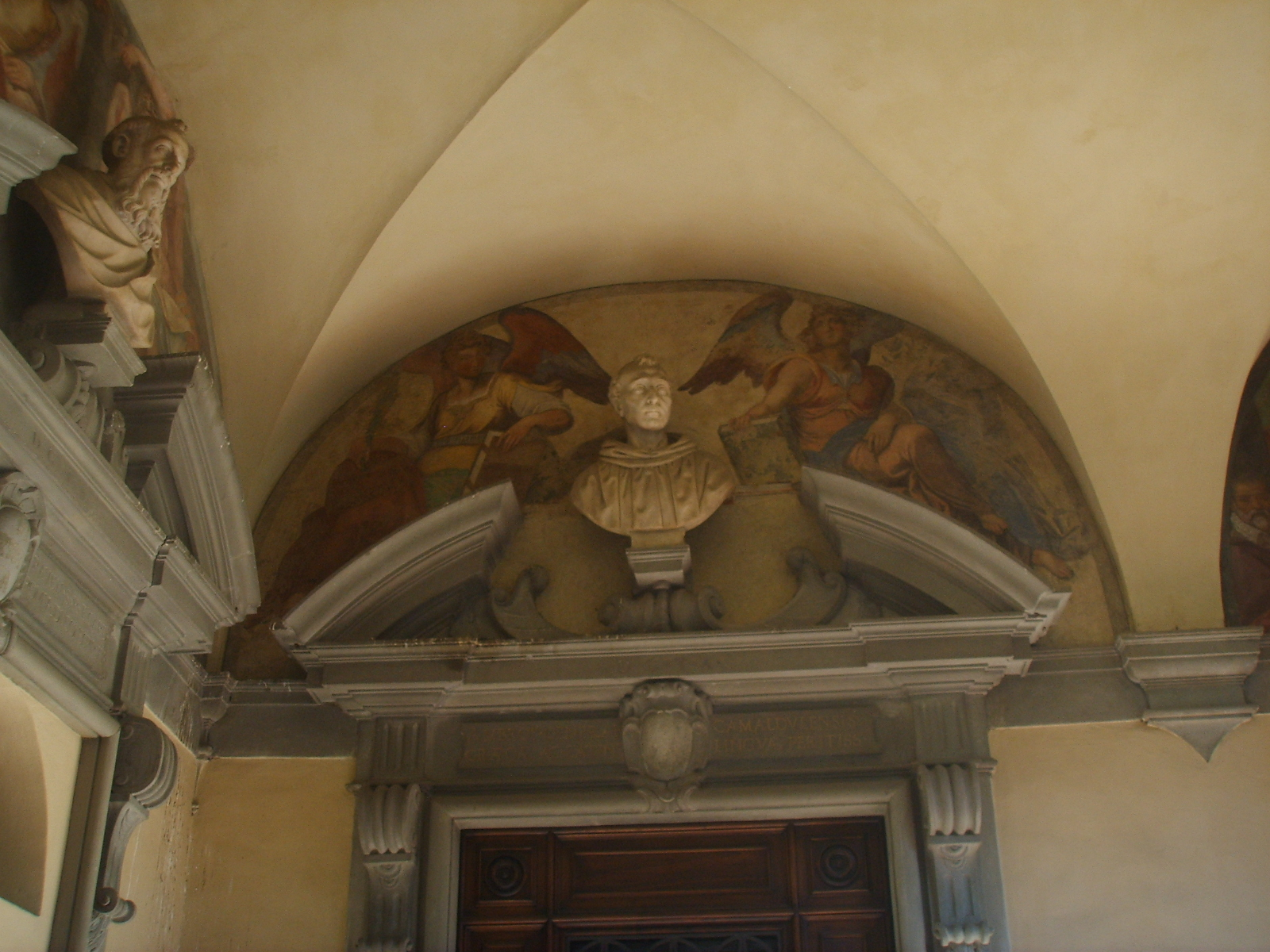 Santa Maria degli Angeli (Florence) lunetta del chiostro della sacrestia decorato con: Anonimo, Busto di Ambrogio Traversari; Pietro Francavilla, angeli.